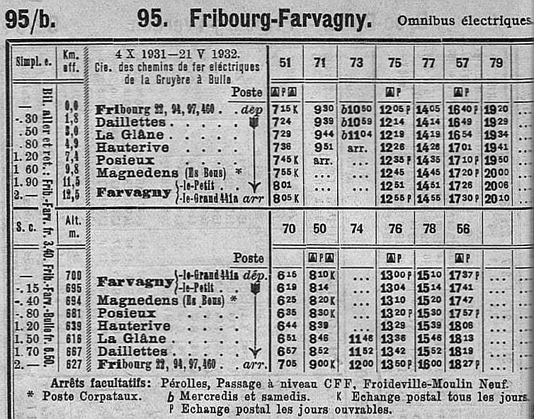 Letzter (Winter-)Fahrplan für die Gleislose Bahn Freiburg–Farvagny, ab dem 22. Mai 1932 fuhr ein Autobus